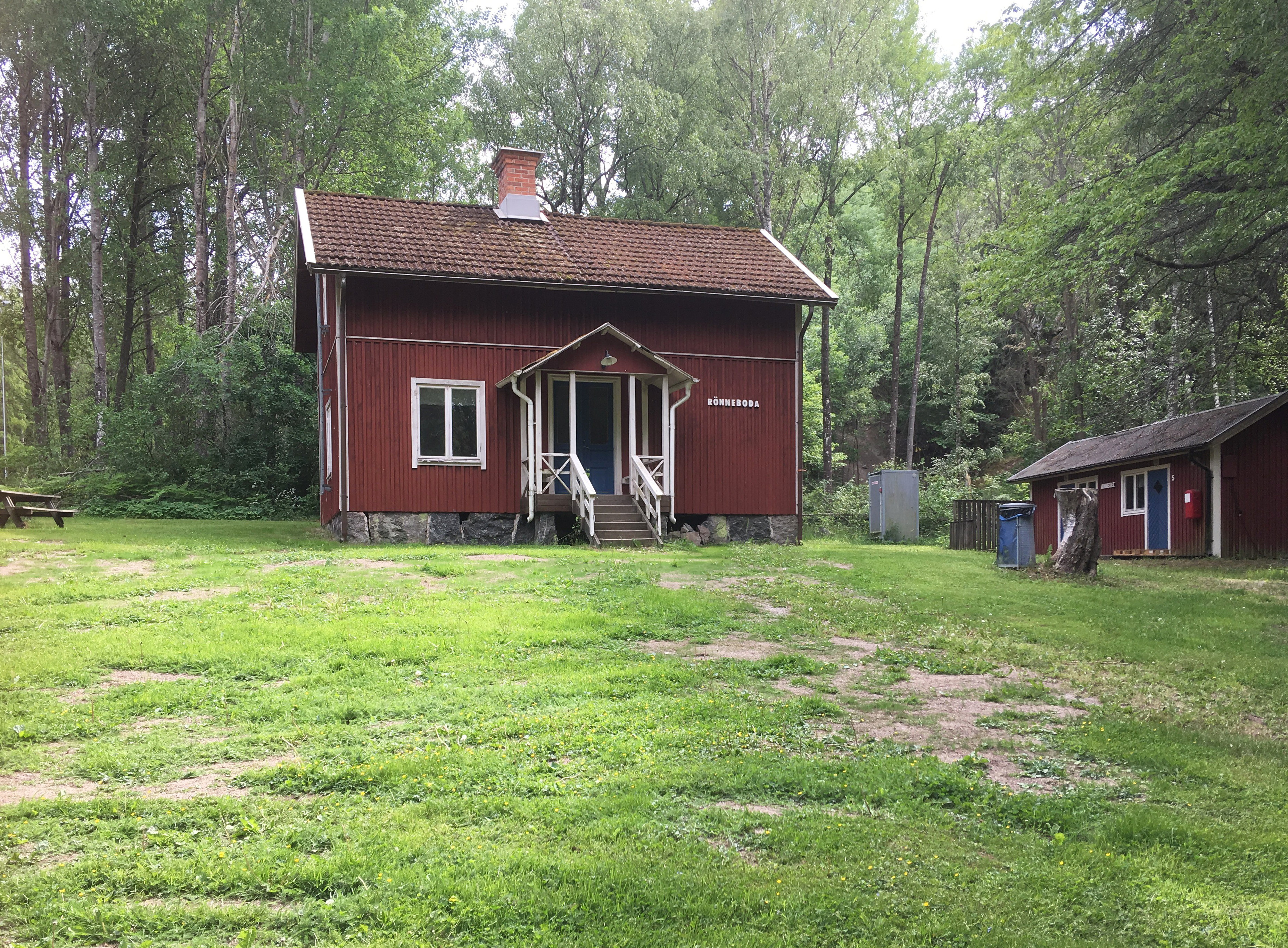 Torpet Rönneboda (Rönnebo) vid Flottsbro låg tidigare under under Älvesta säteri.